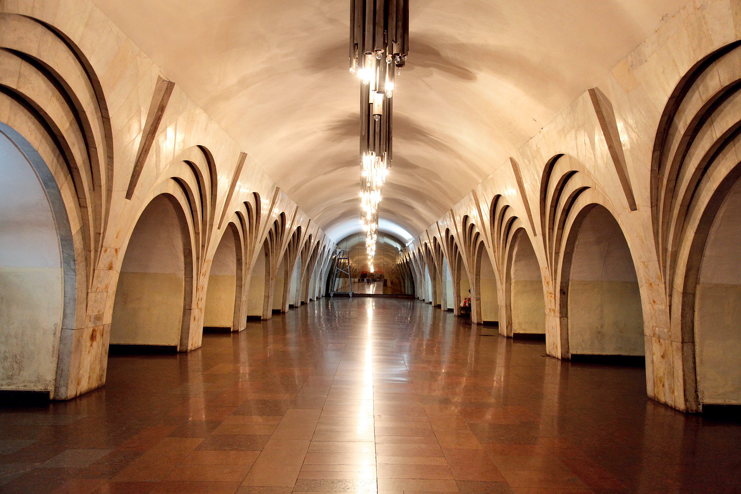 Հանրապետության հրապարակ կայարան